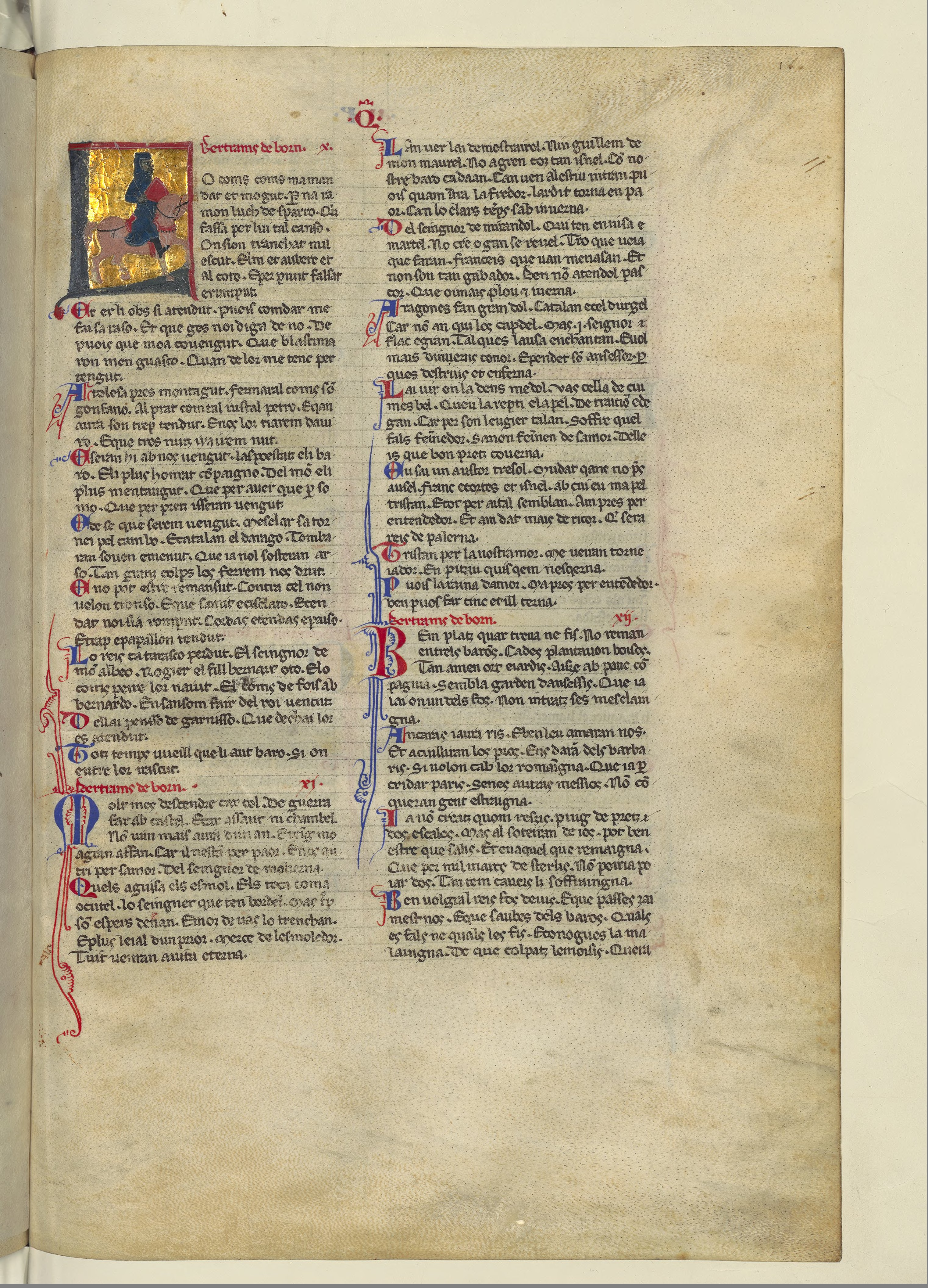 Lo coms m'a mandat e mogut – sirvente by Bertran de Born. Pillet’s № 80, 23; Bibliothèque nationale de France